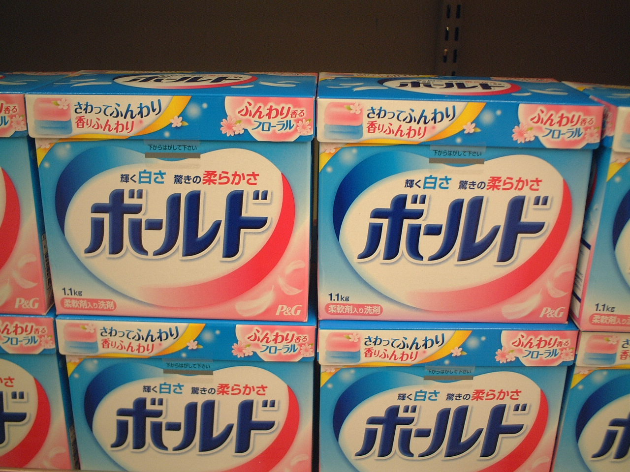 洗剤のボールドスーパーマーケット内にて